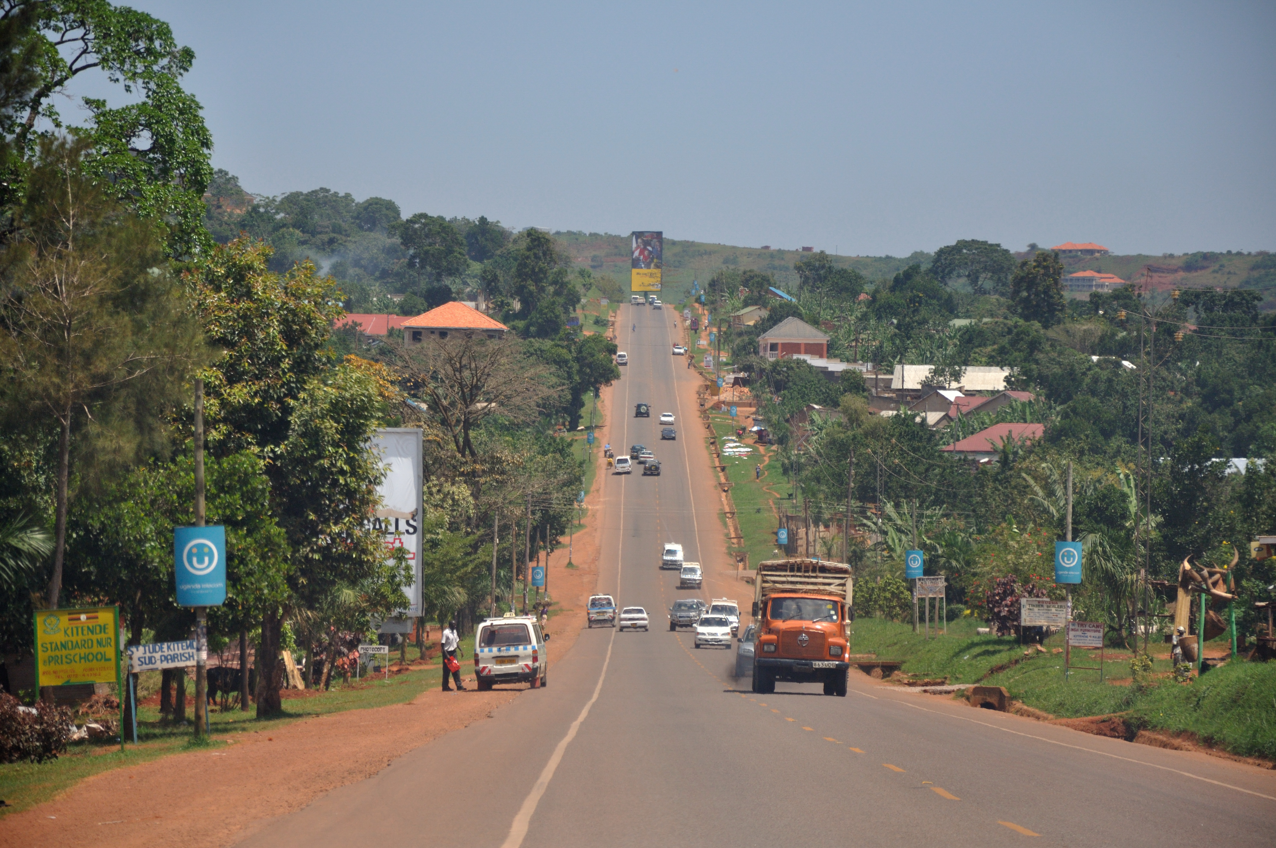 Uganda, Street views between Kampala and Entebbe